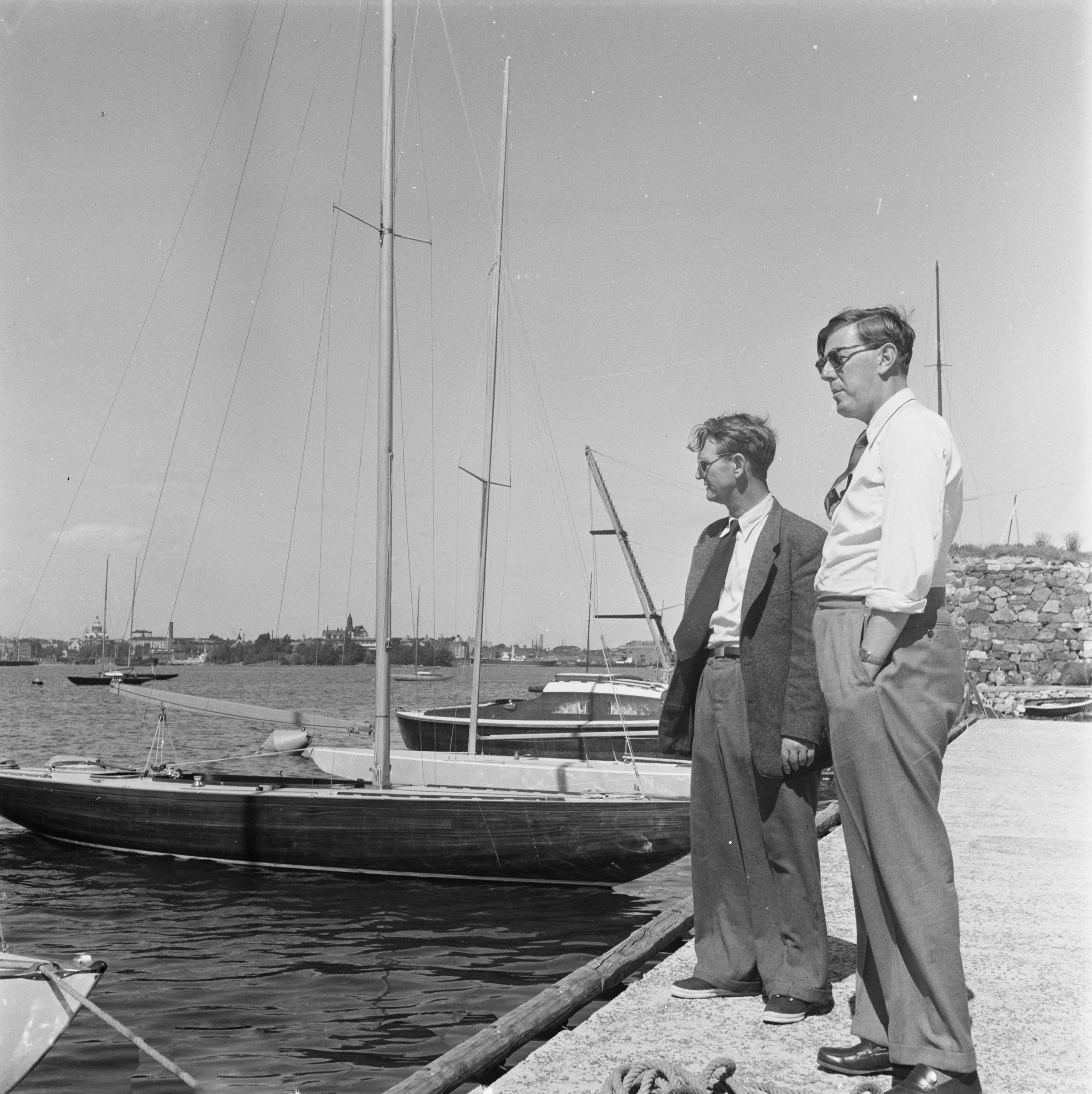 Collectie / Archief : Fotocollectie Anefo Reportage / Serie : Olympische Zomerspelen Helsinki (1952) Beschrijving : Bob Maas en Mr. Stuttenheim in jachthaven Datum : 18 juli 1952 Locatie : Finland, Helsinki Trefwoorden : jachthavens, zeilen Persoonsnaam : Maas, Bob, Stuttenheim Fotograaf : Pot, Harry / Anefo Auteursrechthebbende : Nationaal Archief Materiaalsoort : Negatief (zwart/wit) Nummer archiefinventaris : bekijk toegang 2.24.01.03 Bestanddeelnummer : 905-2185